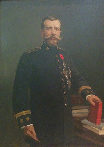 Retrato de Onofre Mata y Maneja